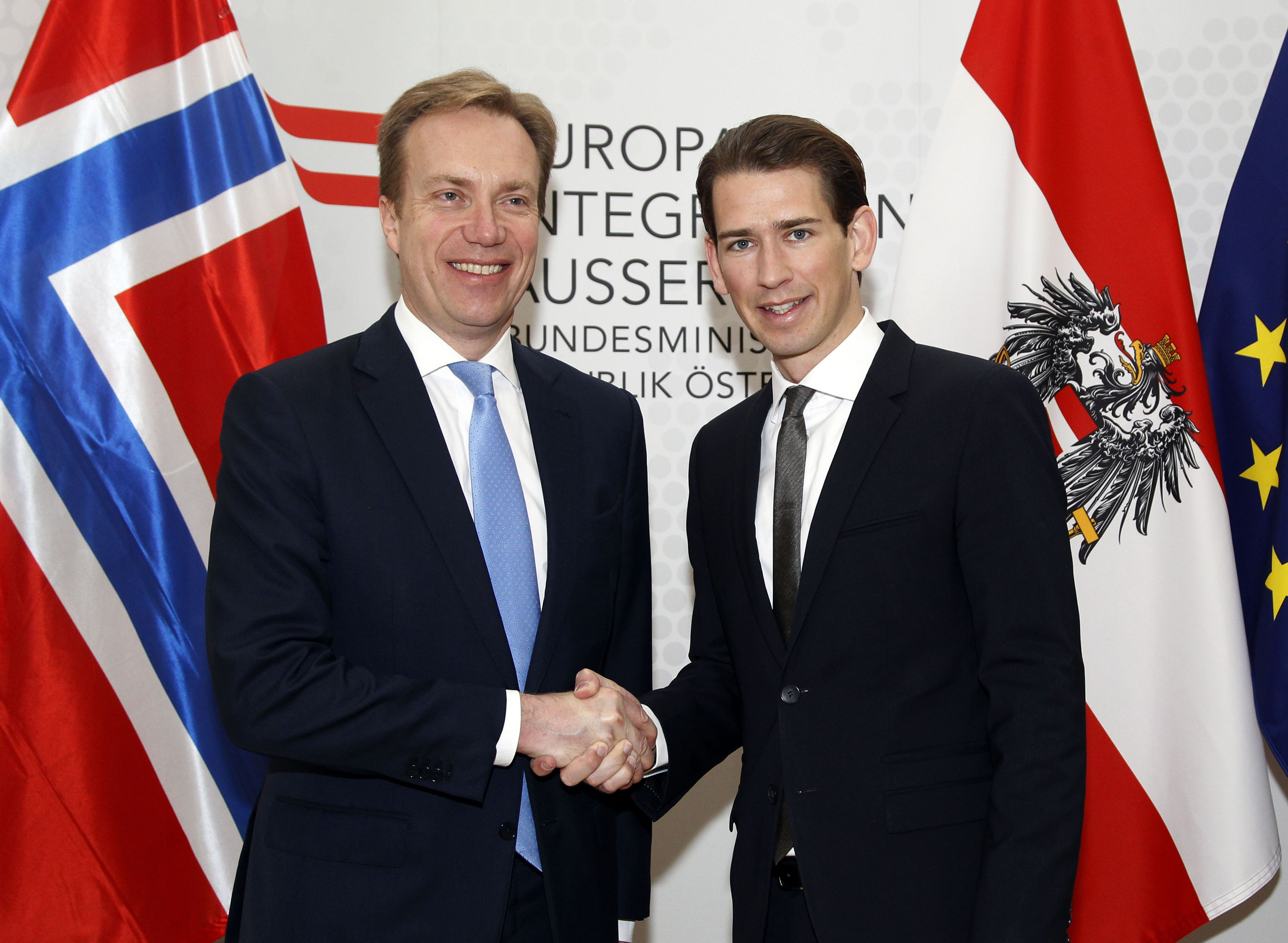 Freitag, den 1. April 2016 traf Außenminister Sebastian Kurz im Außenministerium in Wien mit dem Außenminister von Norwegen Borge Brende, zu einem Arbeitsgespräch zusammen. Foto: Mahmoud